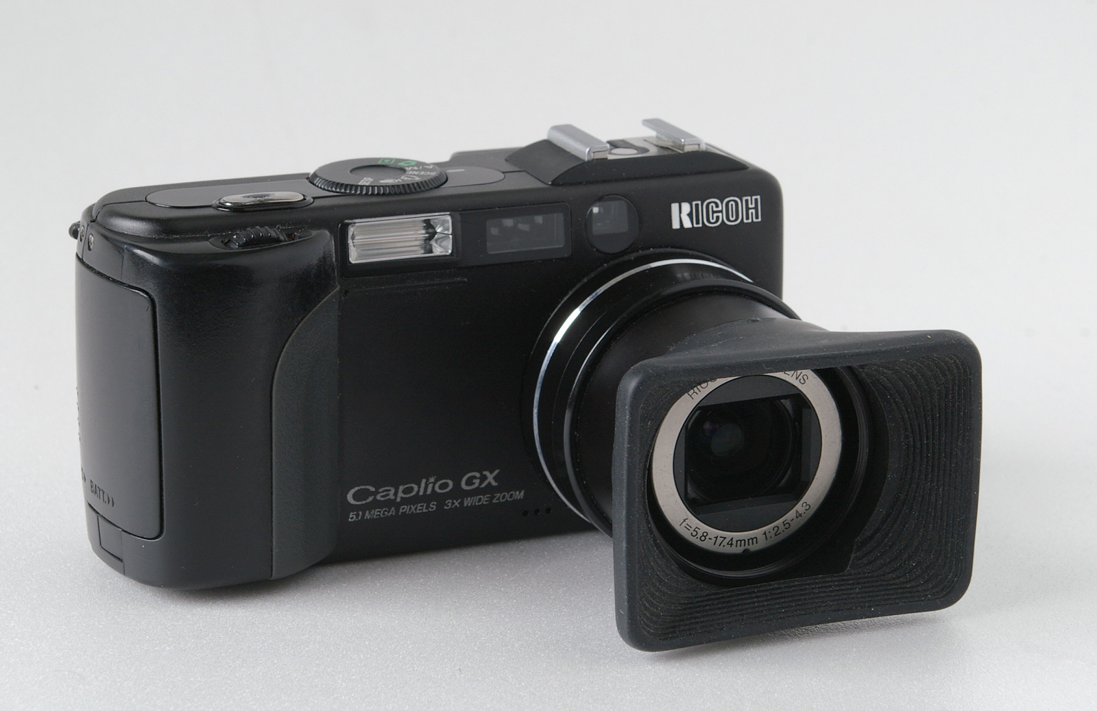 Digitale Kompaktkamera Ricoh Caplio GX, montiert mit dem als Zubehör erhältlichen Filter- und Vorsatzadaptertubus und Streulichtblende